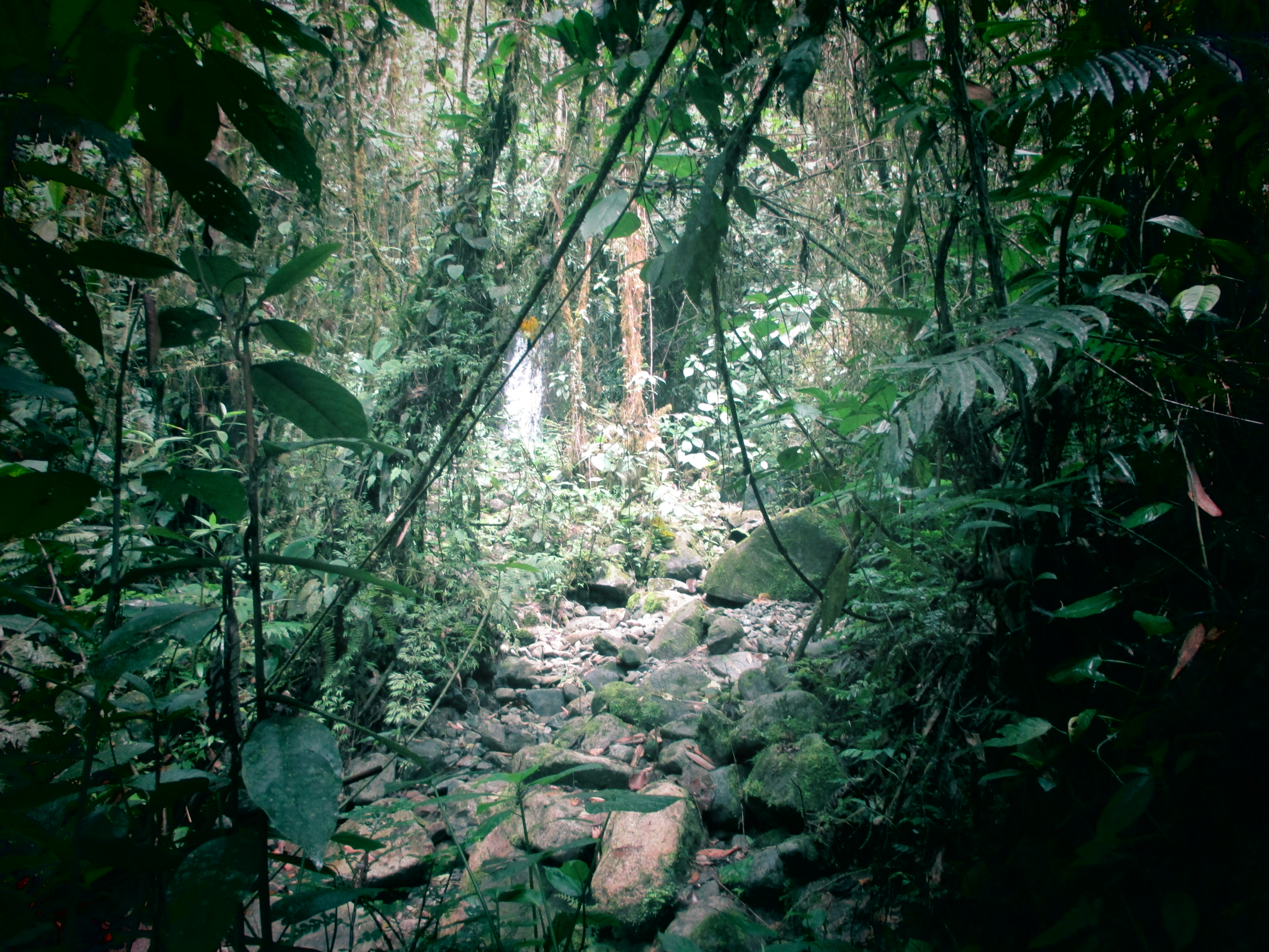 Momentos previos a la llegada a una pequeña cascada pero muy potente; un lugar ideal para refrescarse y adorar la belleza natural del entorno. Esta fotografía fue tomada en el municipio colombiano con código 76111.